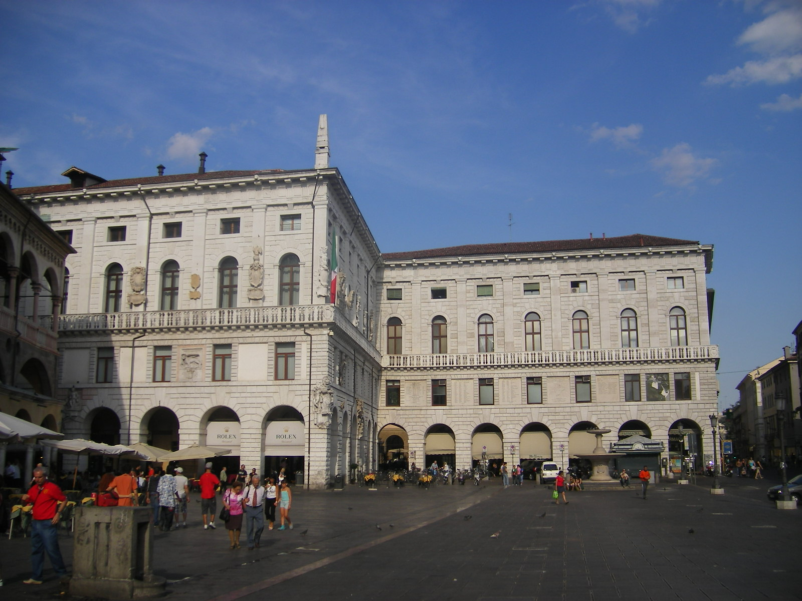 Padova